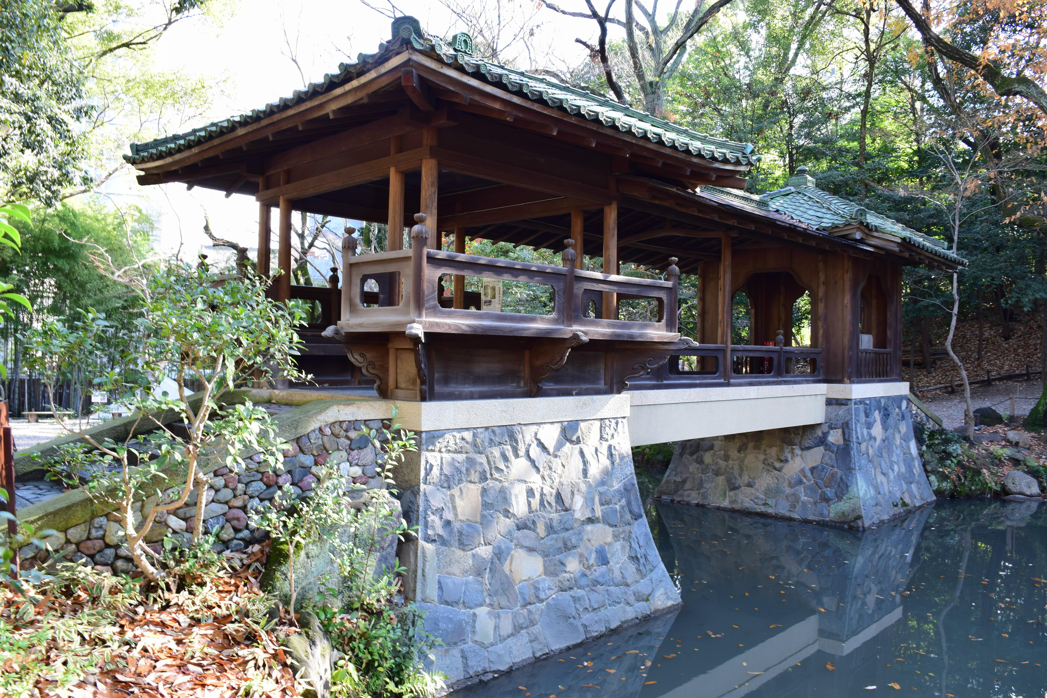 揚輝荘白雲橋